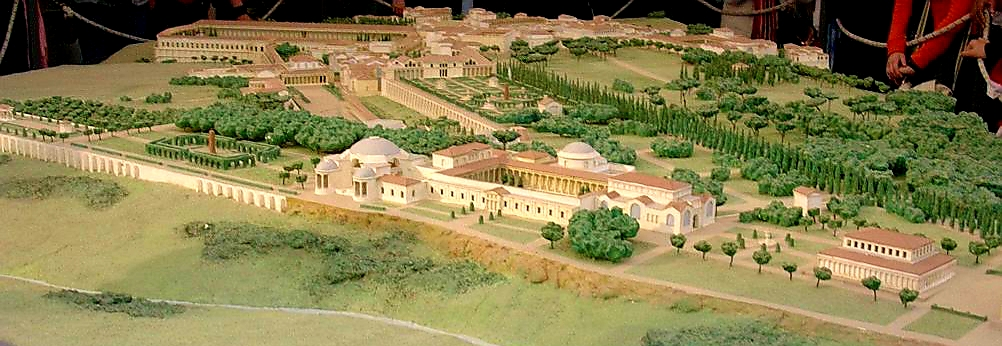 Reconstitution du domaine impérial de l'empereur Hadrien, Maquette de la Villa Adriana, Villa Adriana, Tivoli Auteur Guilhem Dulous